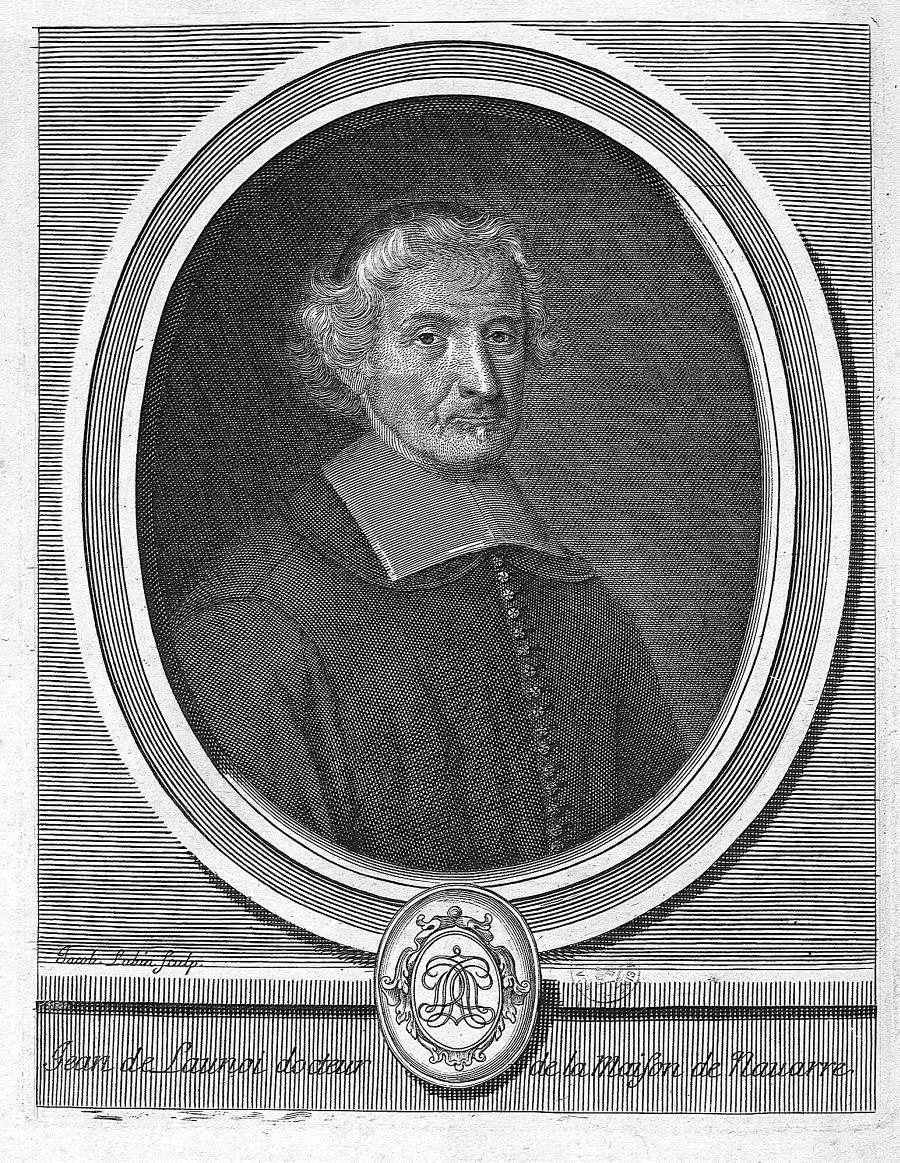 Portrait de Jean de Launoy